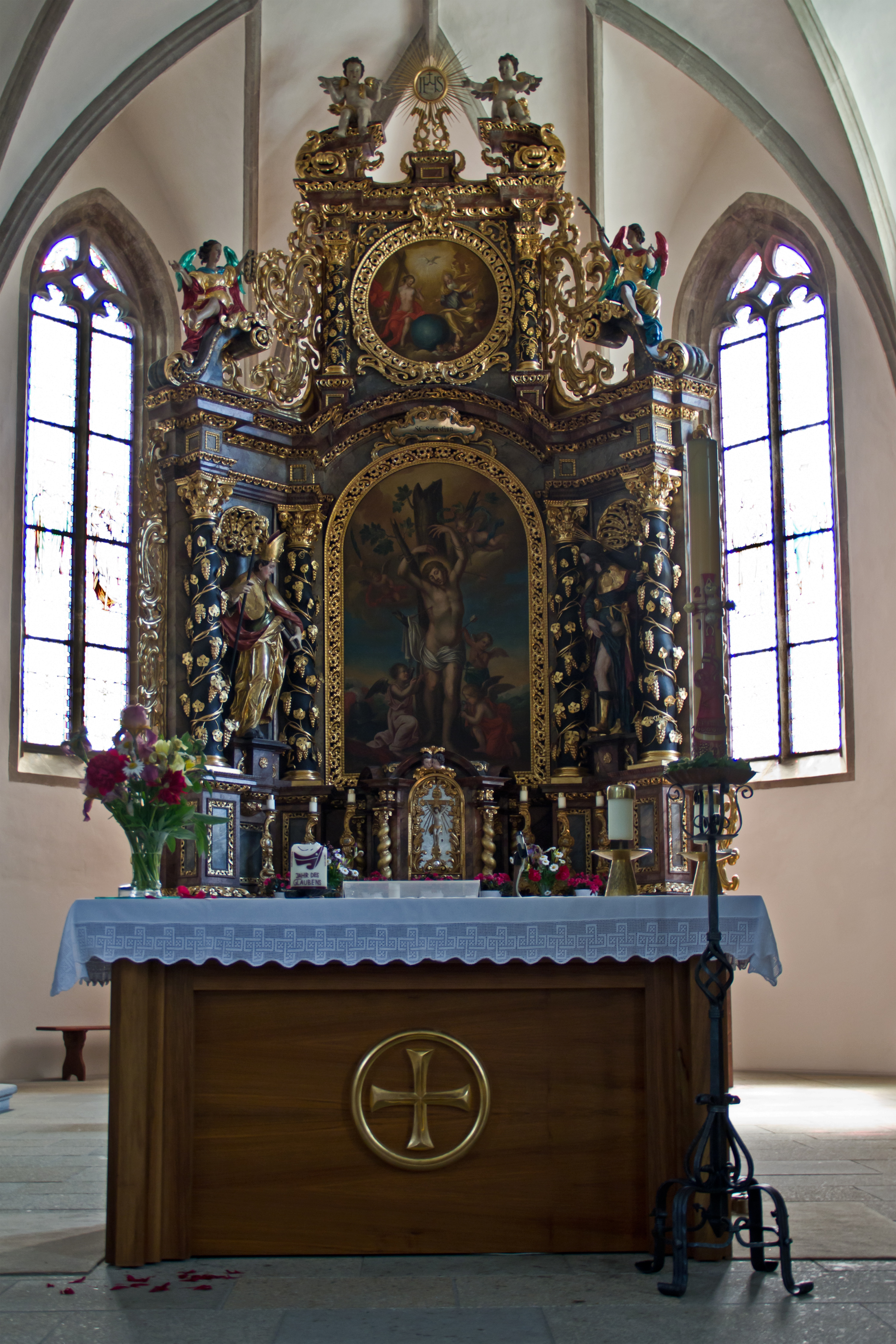 Kath. Pfarrkirche Hl. Johannes der Täufer in Waldhausen - Altar